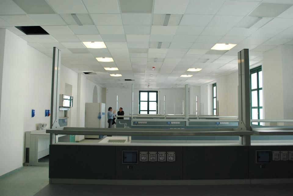 Vista dei laboratori dell'EBRI